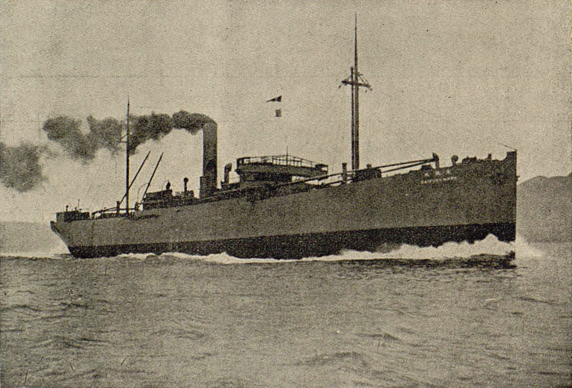 Vapor japonès Raifuku Maru, construït en 29 dies.